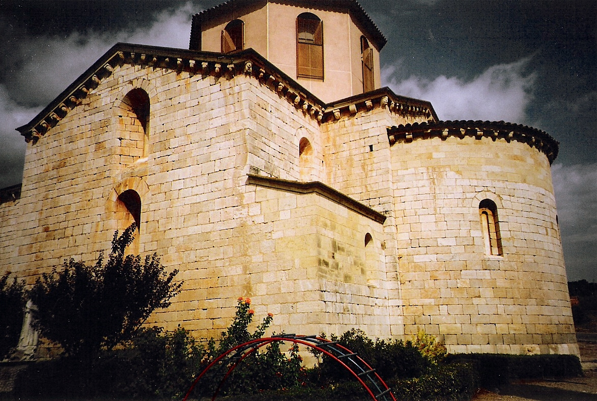 Església de Sant Ramon de Penyafort, al Pla de Santa Maria